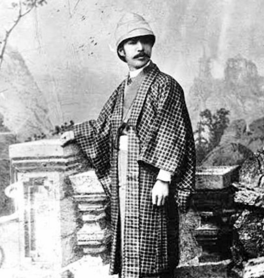 Fotógrafo japonés naturalizado guatemalteco Manuel de Jesús Yas.